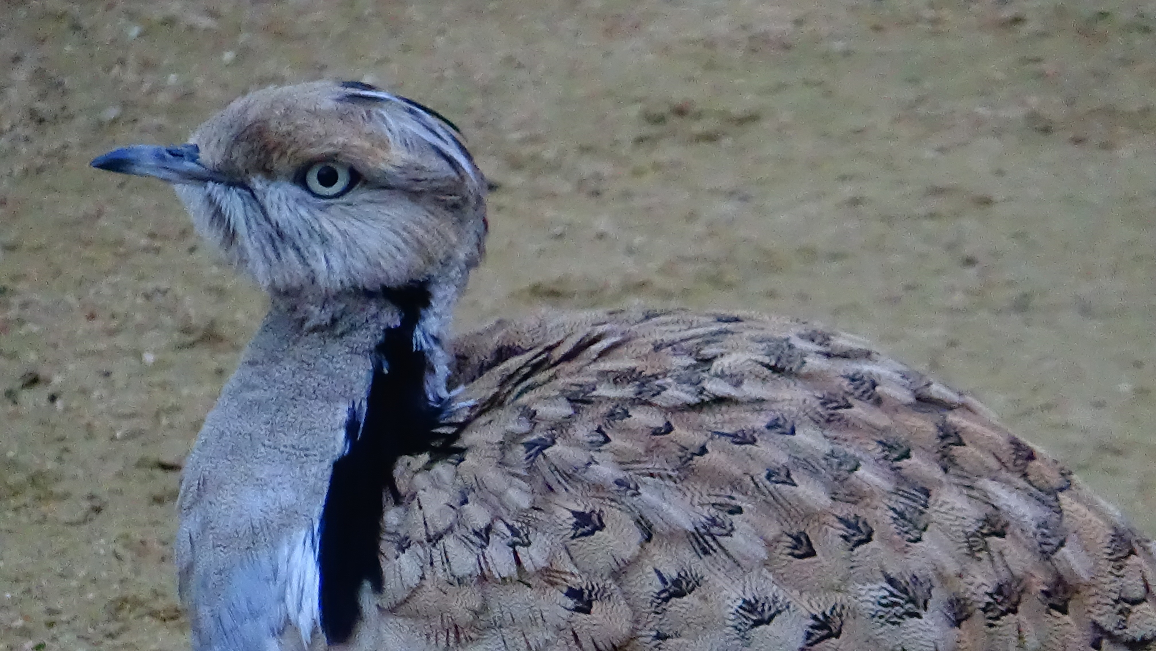 Chlamydotis macqueenii - Outarde de Macqueen - Outarde houbara d-asie - cedric loury - wiki13